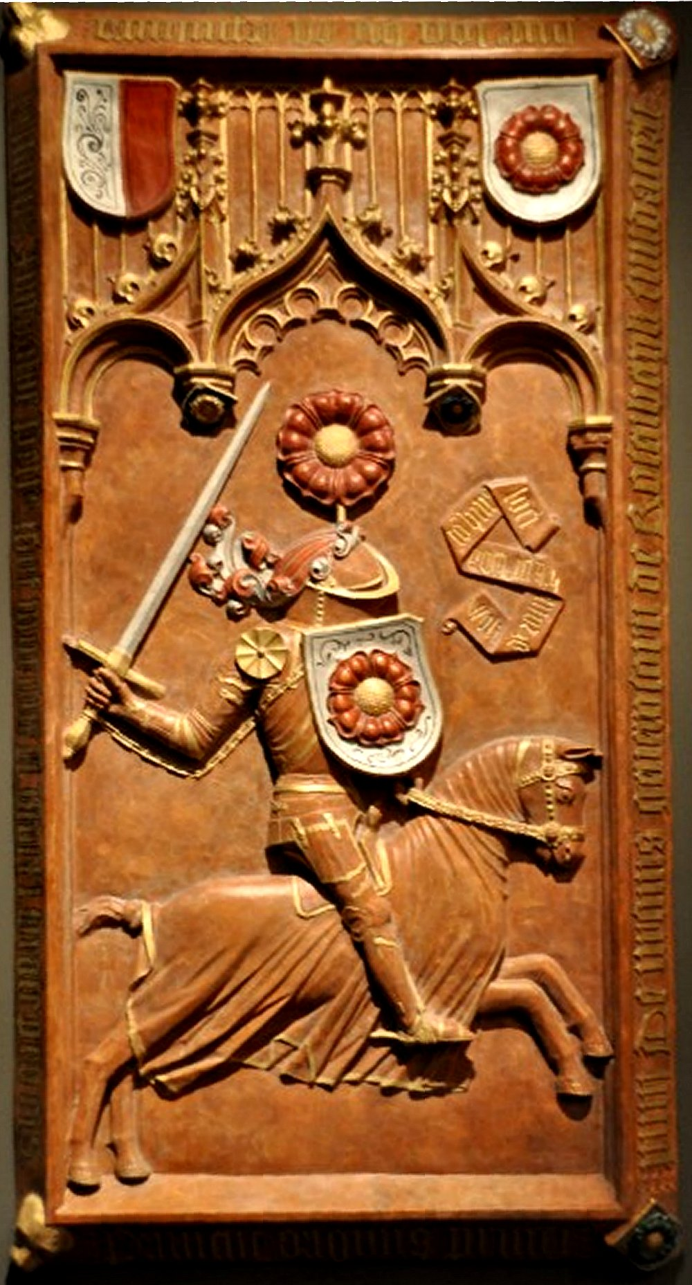 Rožmberský epitaf ve Vyšším Brodě